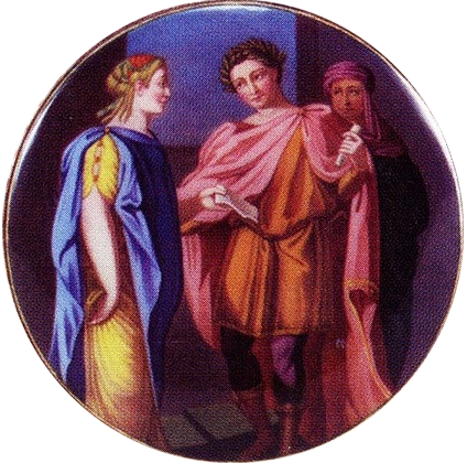 Тит и Береника (эмалевая миниатюра крышки карманных часов)